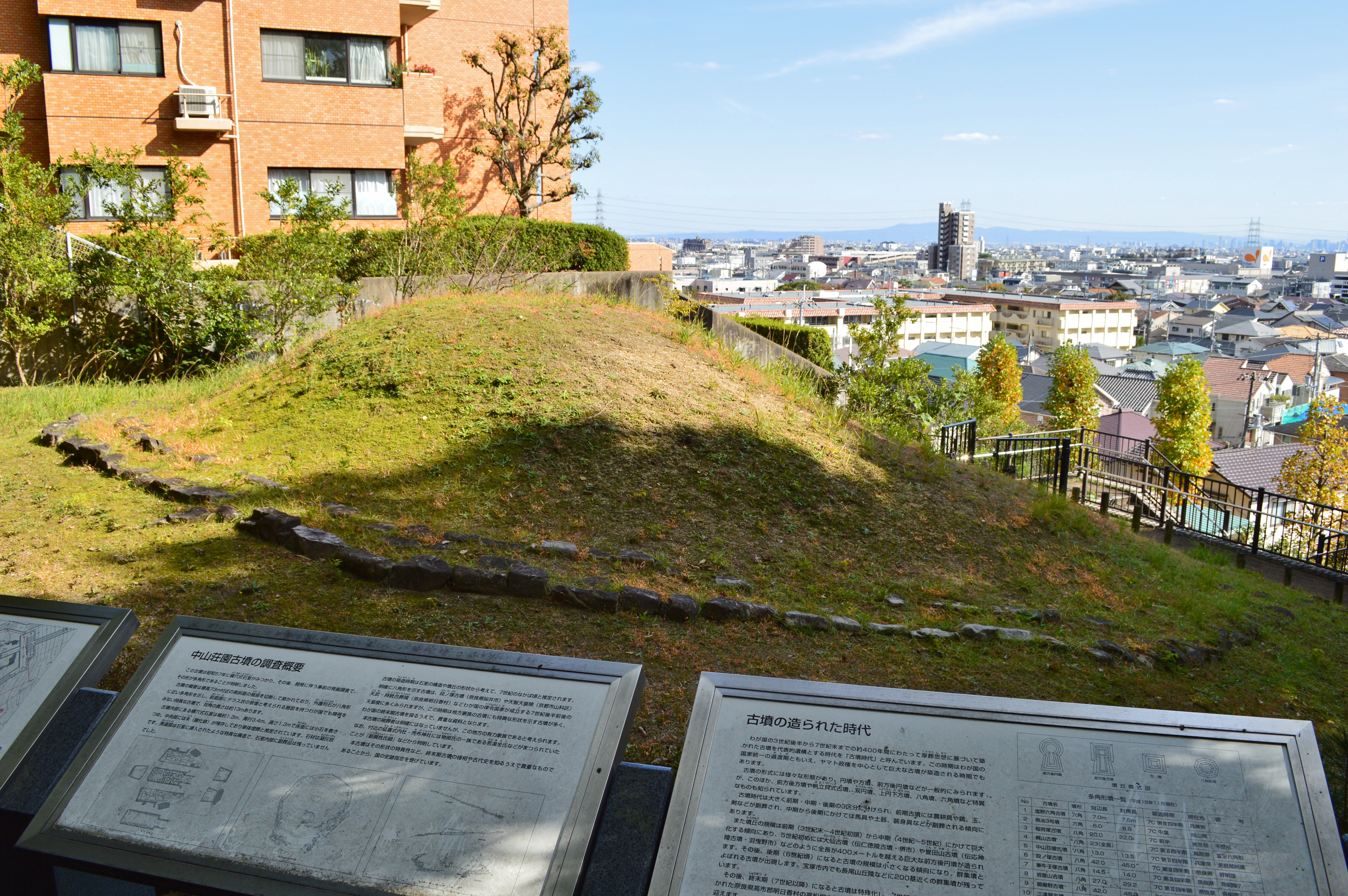 中山荘園古墳 墳丘